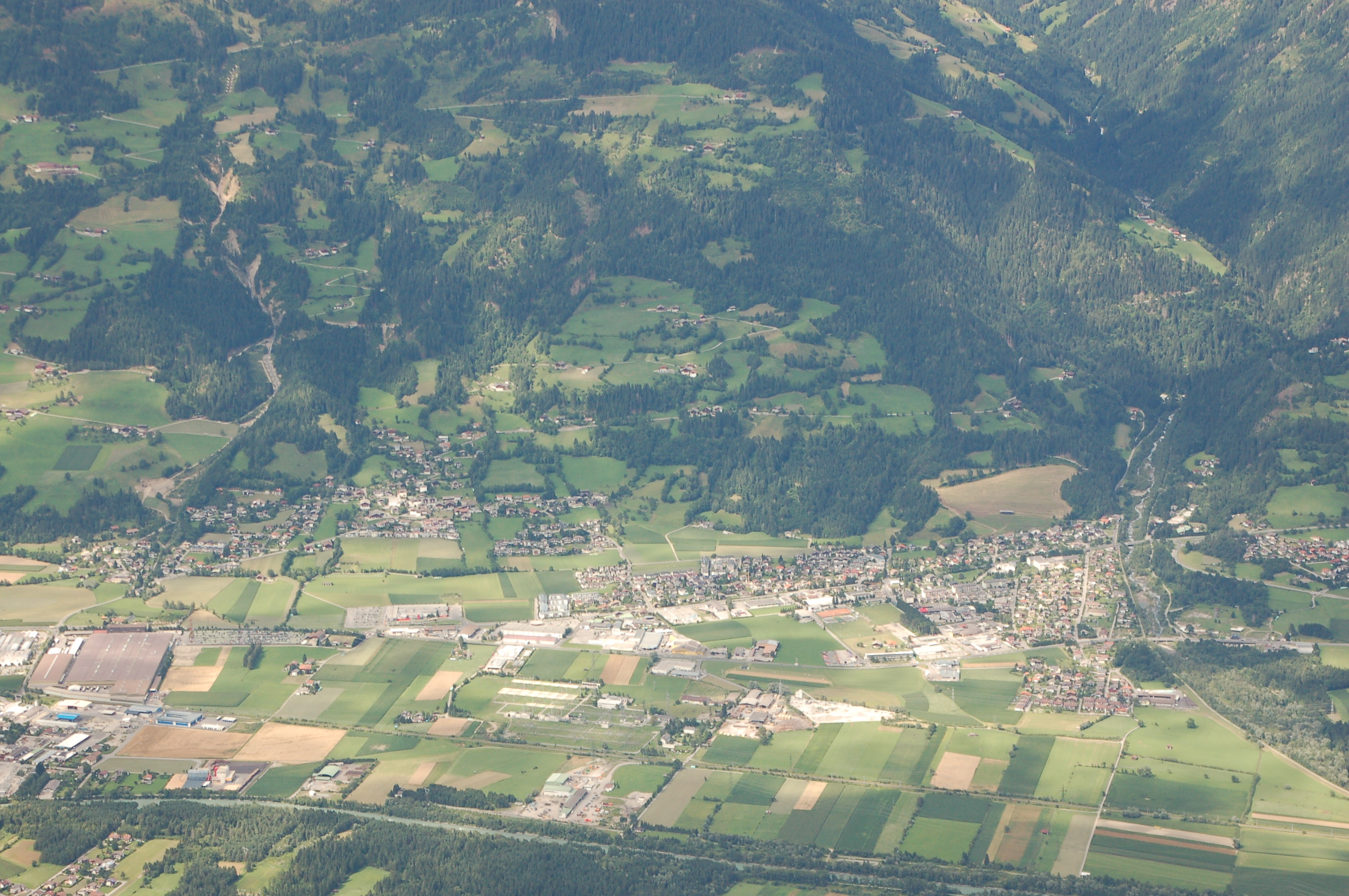 Die besiedelten Gebiete der Gemeinde Nußdorf-Debant, fotografiert von der Laserzwand. Links Nußdorf, rechts Debant. Darüber der Nußdorfer Berg und der Eingang zum Debanttal. Am linken Rand der Wartschenbach